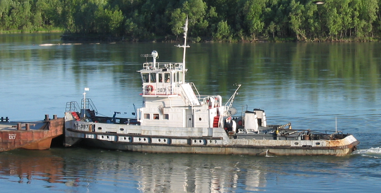 Буксирный теплоход РТ проекта 911В